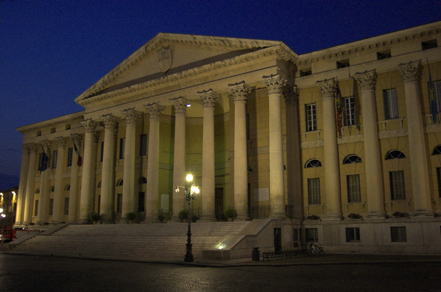 Foto notturna di palazzo Barbieri (originariamente Gran Guardia Nuova), sede del comune di Verona